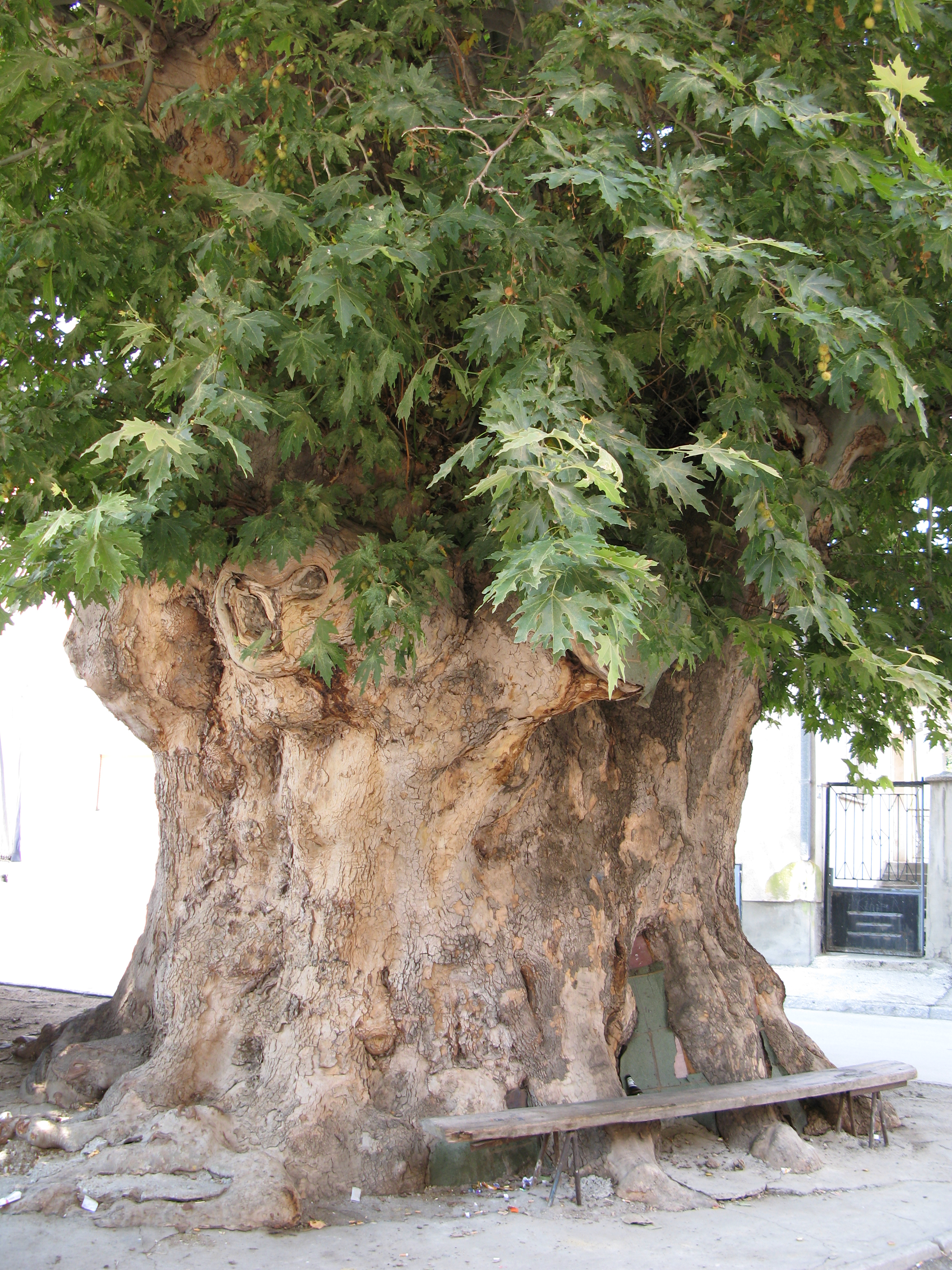 Veliki Platan, Bitolj.